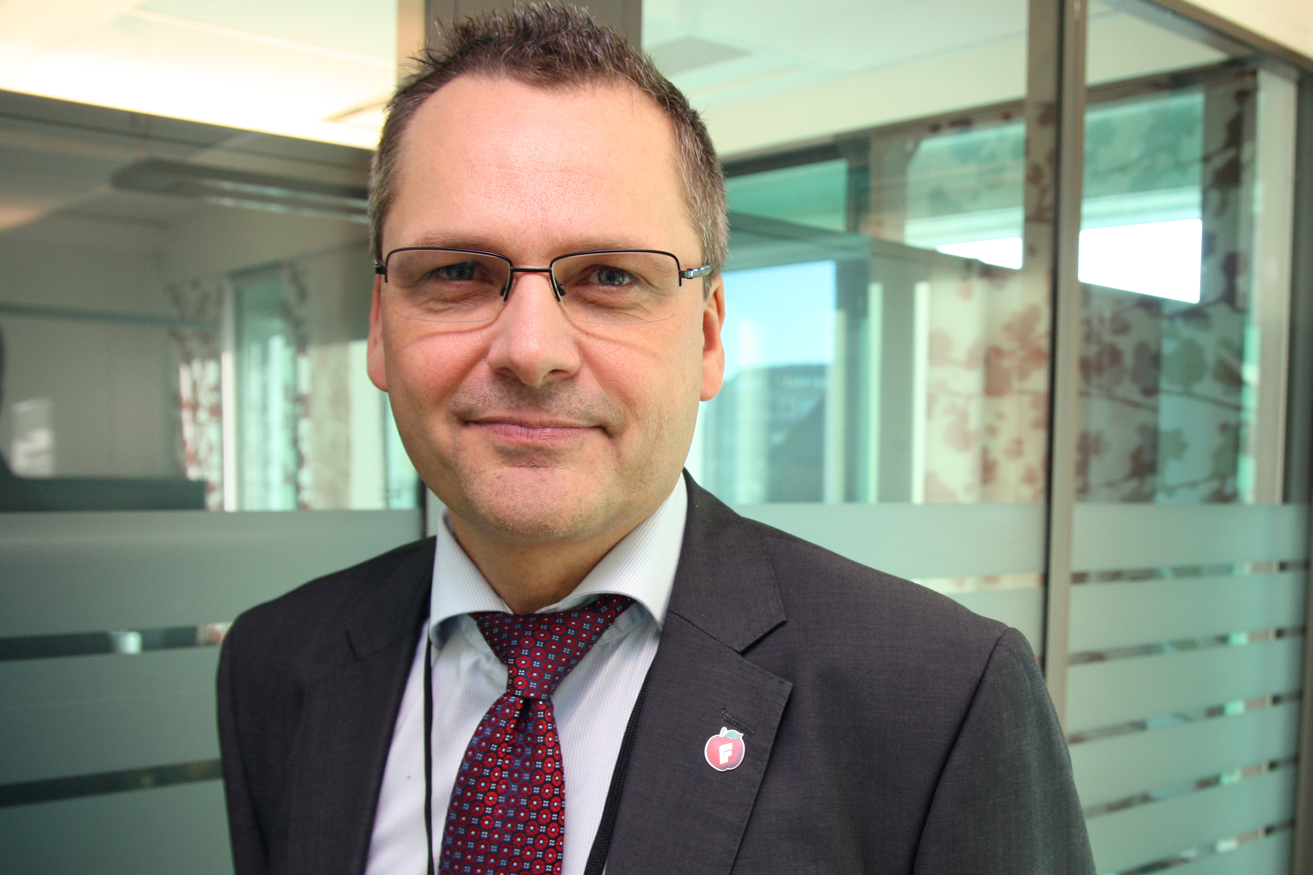 Statssekretær i Arbeidsdepartementet